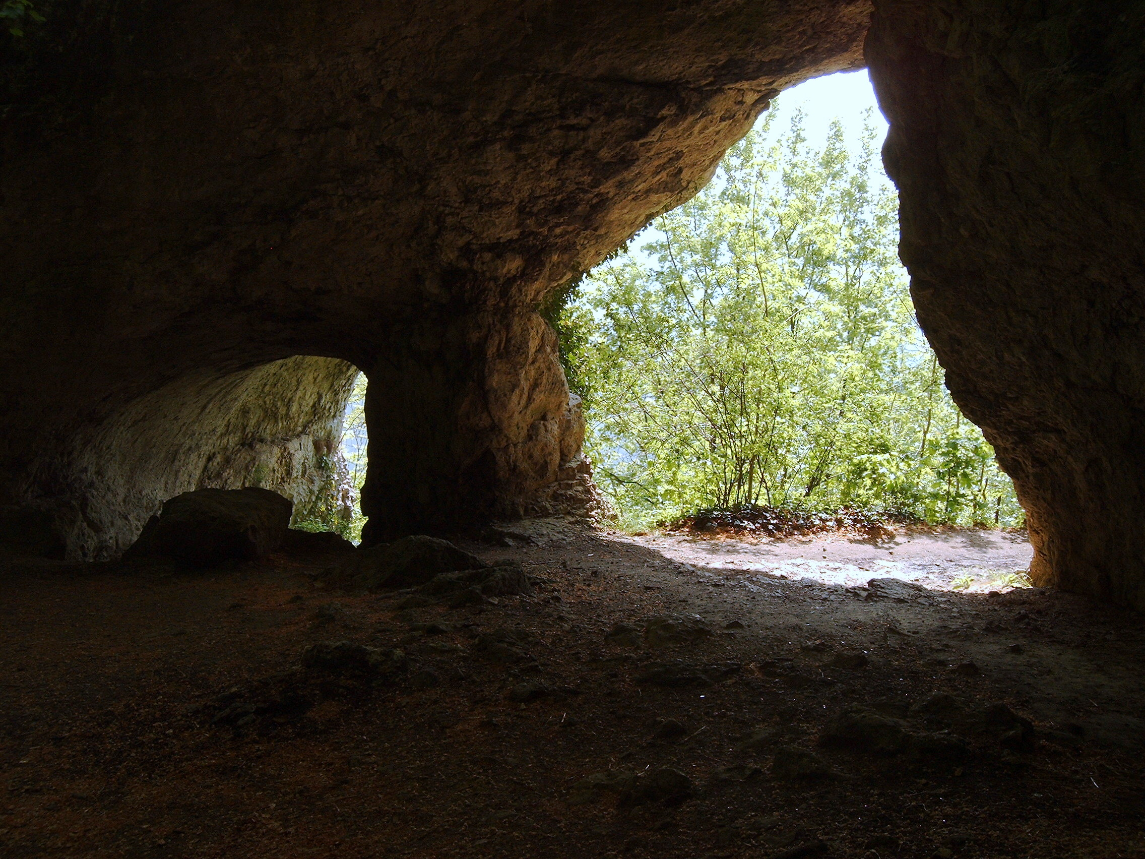 Hohler Fels (E2), Höhle bei Happurg